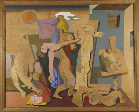 Karl Lorenz Kunz - Ölgemälde: Krieg